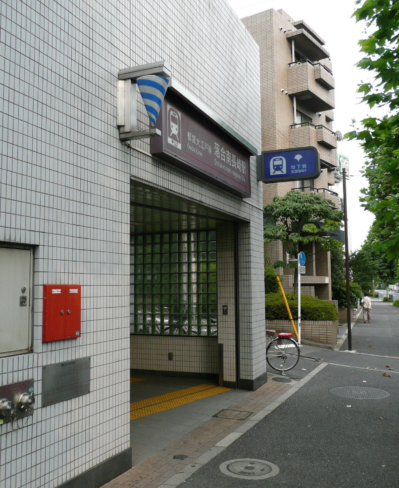 落合南長崎駅A2出入口